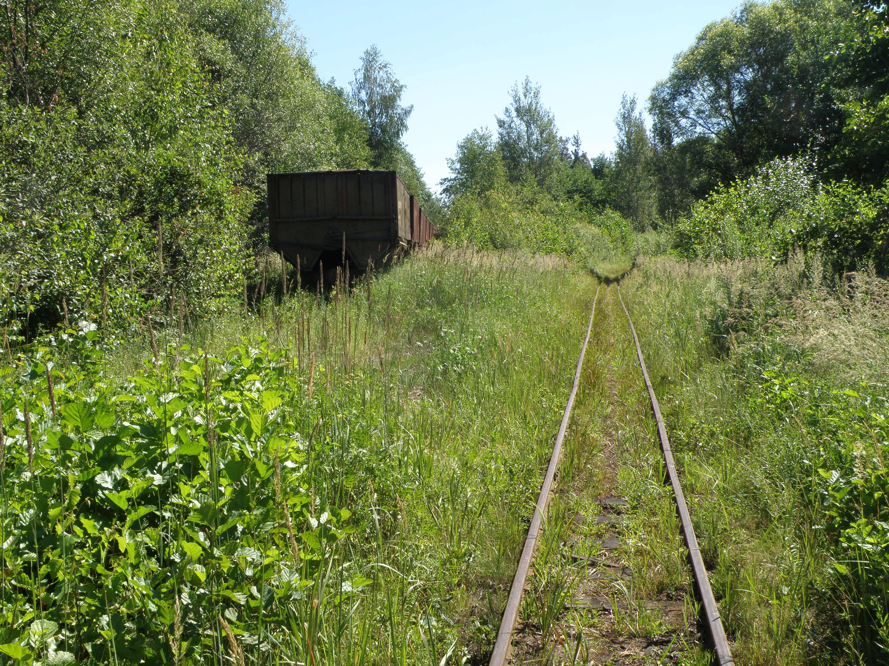 Узкоколейка Мезиновского торфопредприятия, главная действующая ветка